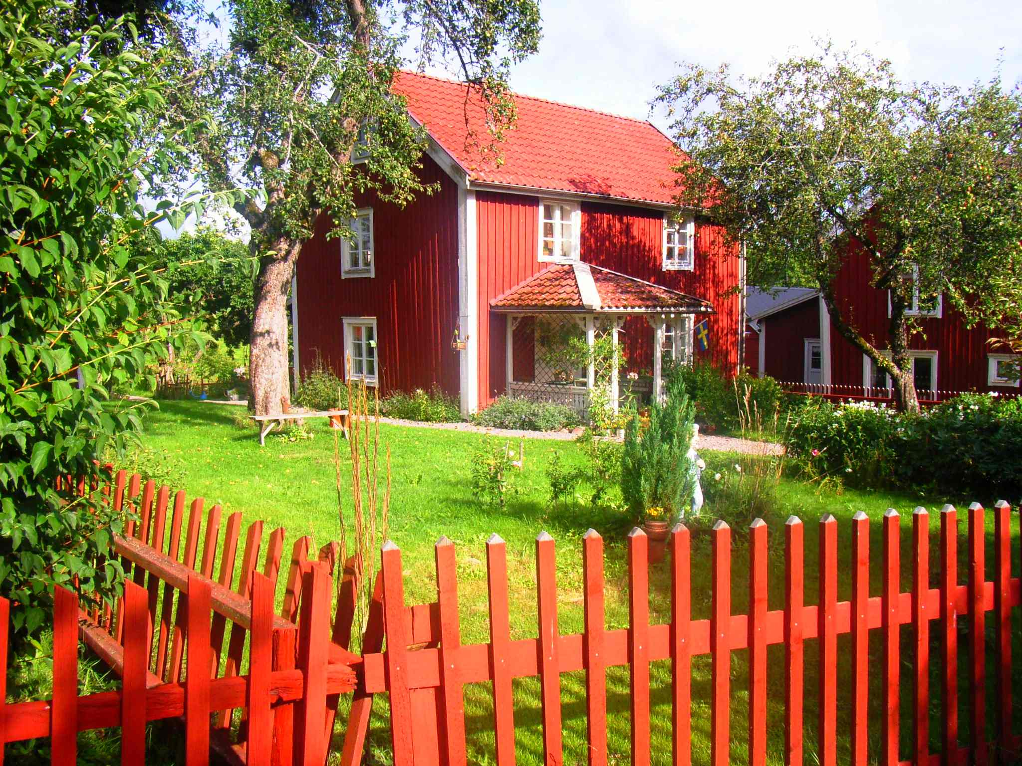 Das kleine Dorf Bullerbü (schwedisch: Bullerbyn) in der Nähe von Vimmerby, bekannt durch "Wir Kinder aus Bullerbü" von Astrid Lindgren.